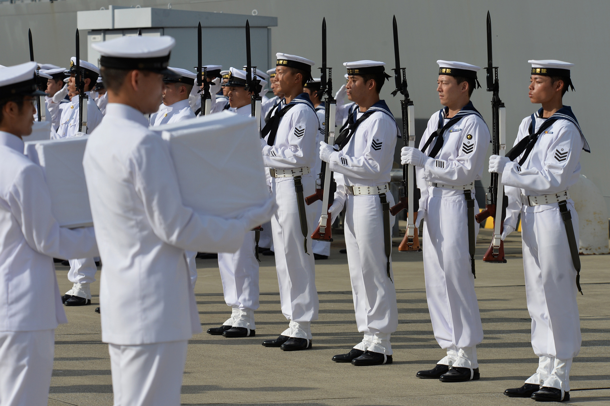 JMSDF Sailors Summer CeremonialDress Uniform